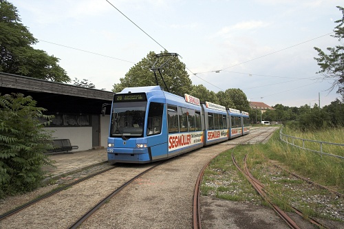 Trambahn-Haltestelle Olympiapark Süd/Schleife Ackermannstr. München; wegen Gleisarbeiten beim Olympiapark-West wurde an diesem Wochenende dort gewendet. Gegen Abend sogar mal wieder Planbetrieb wg. Feuerwerks-Event im Olympiapark